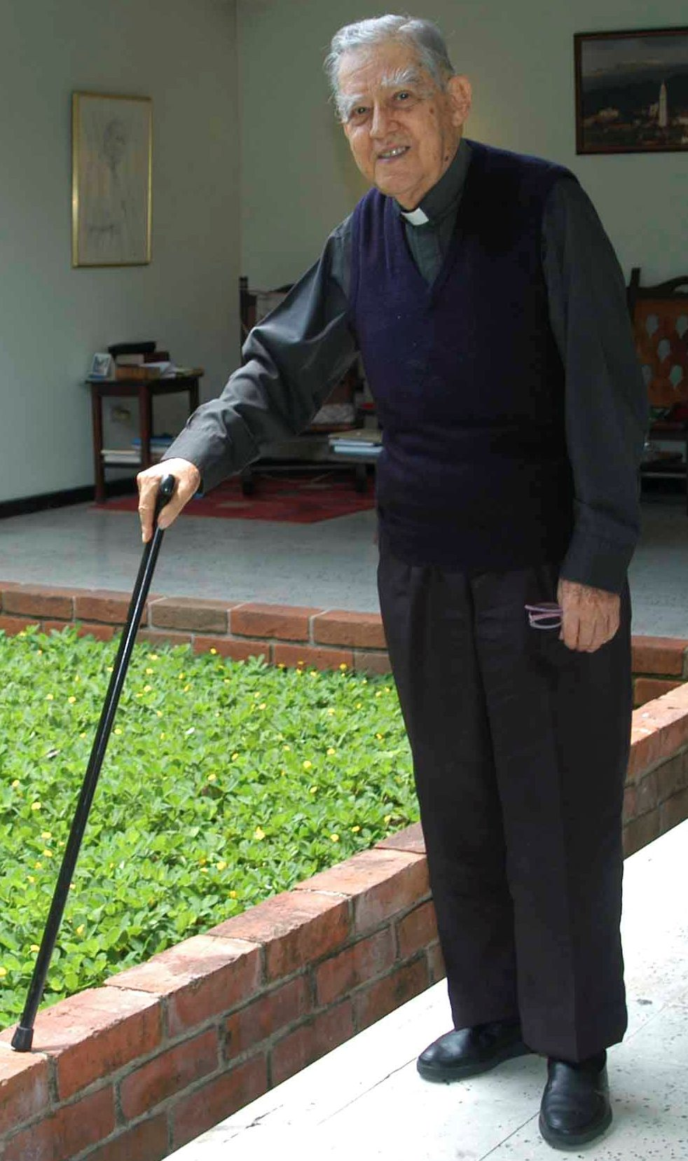 Monseñor Calderón en su residencia de retiro en Cartago (Valle)